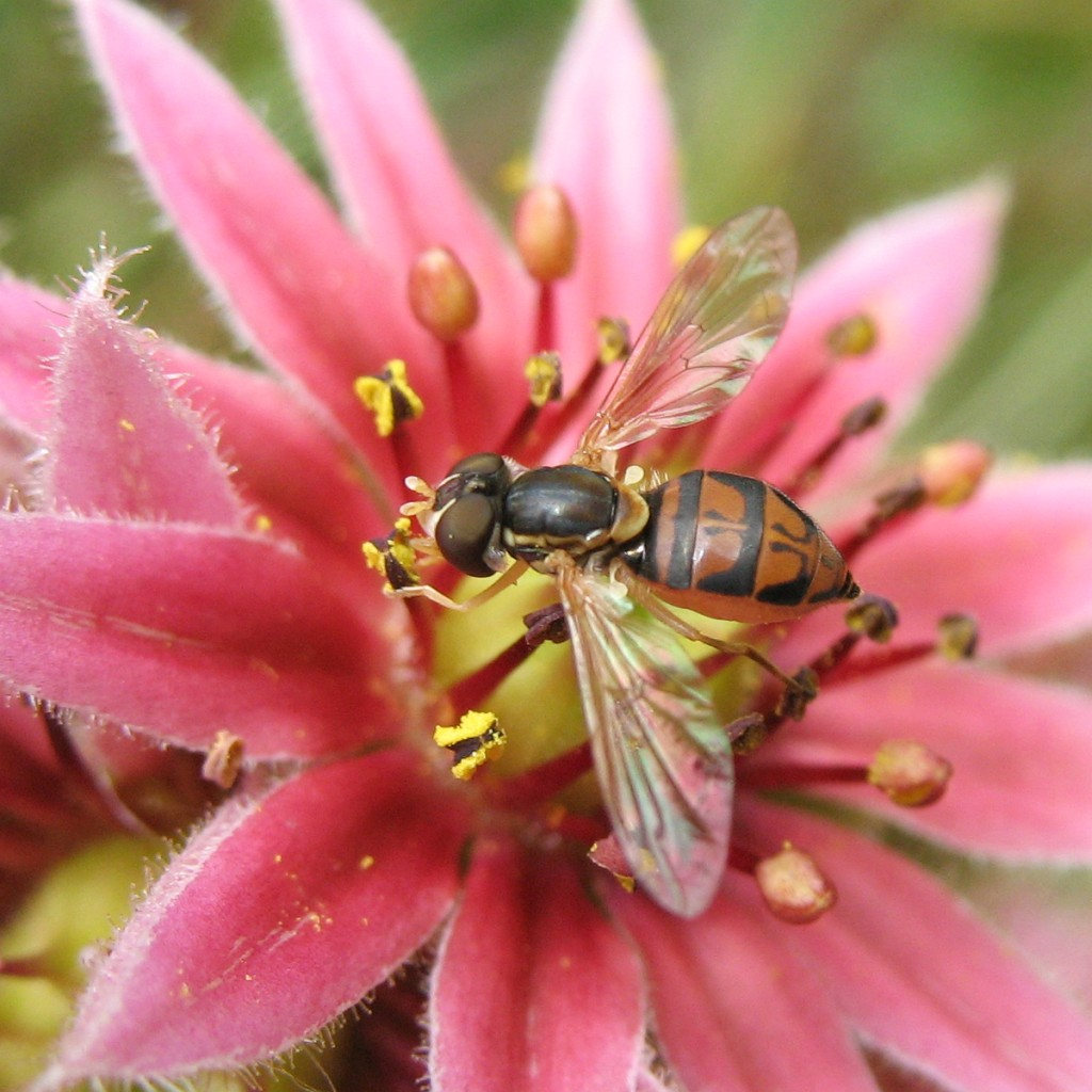 Syrphidé Toxomerus (femelle) sur fleur de joubarbe. Toxomerus syrphid fly (female) on Sempervivum flower. Bas-Saint-Laurent, Province de Québec, Canada. 3708-2007 Canon PowerShot A620.